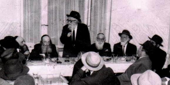 הרבנים: דוד זריצקי, דב סוקולובסקי, מנדל זקס ואחרים בקבלת פנים שערכו תלמידי ישיבת ראדים לרב זקס בירושלים 1962